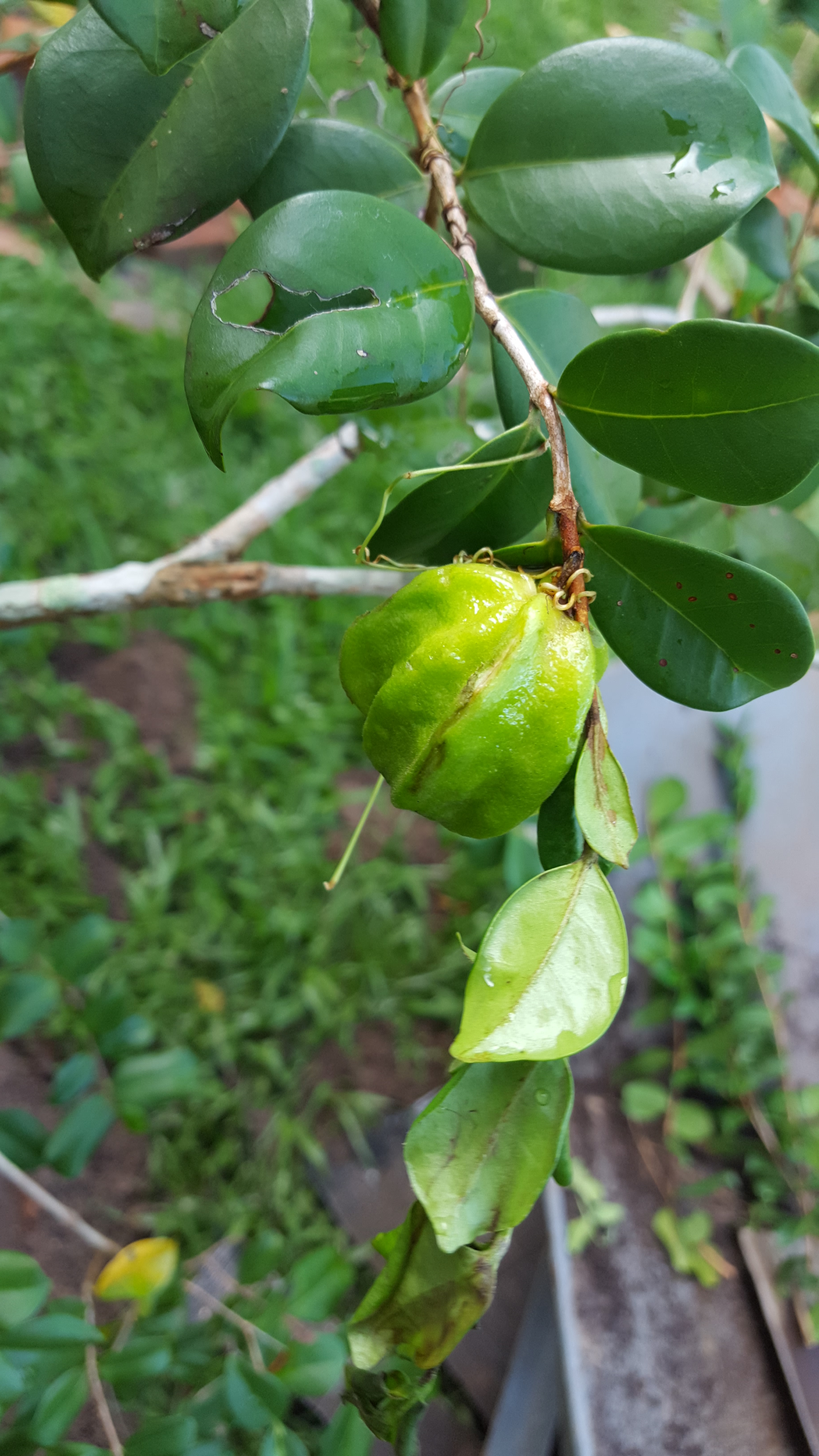 Espécime jovem de pitangatuba